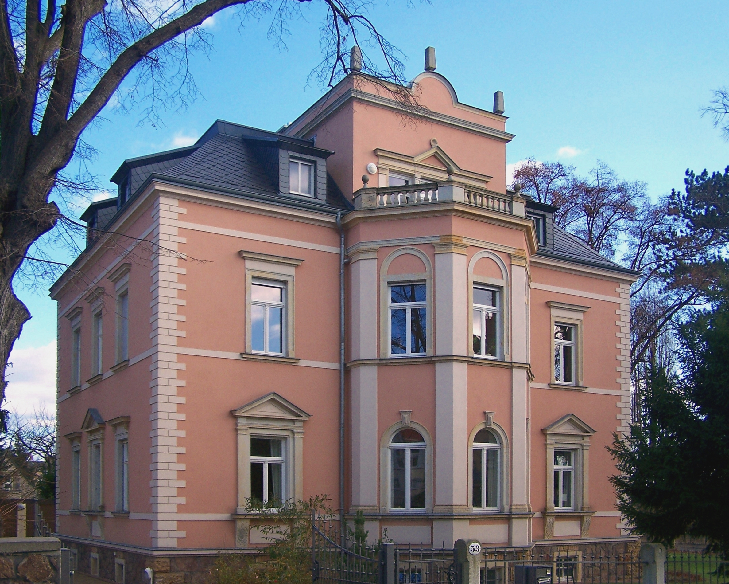 Villa Carl Hugo Haußhälter (Hauptstr. 53) in Radebeul